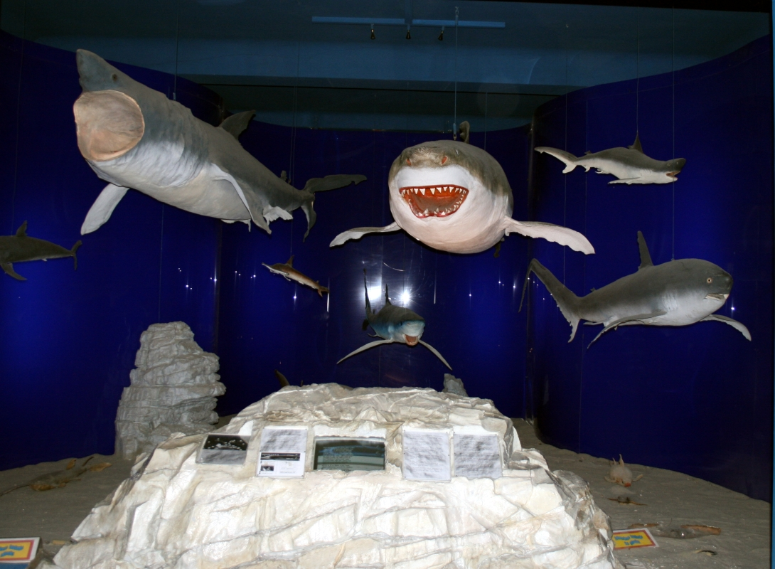 Prirodoslovni muzej Rijeka u Rijeci